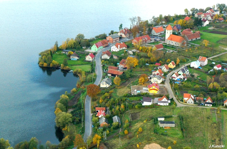 Świetajno